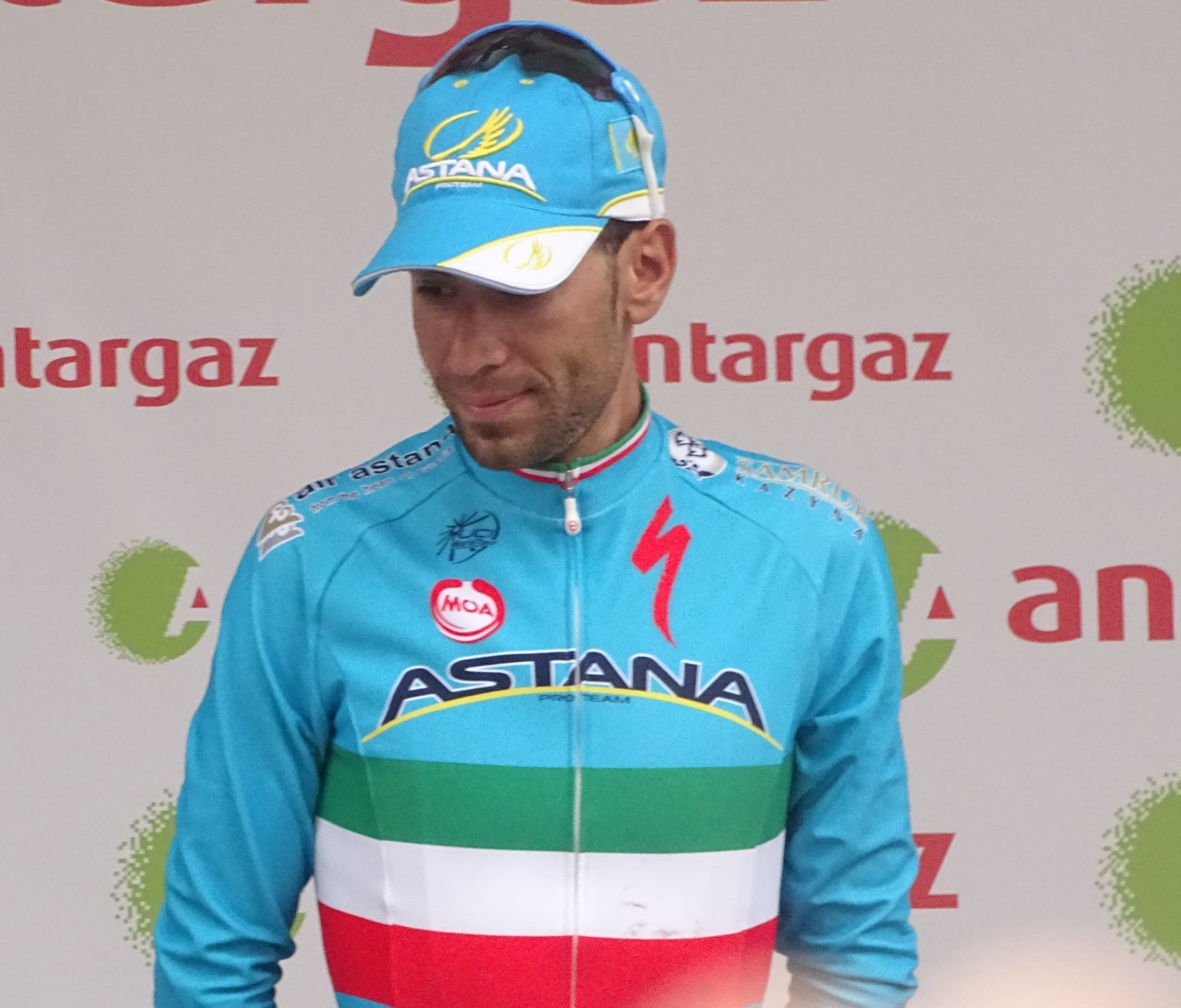 Reportage réalisé le mardi 7 juillet à l'occasion de l'arrivée de la quatrième étape du Tour de France 2015 à Cambrai, Nord-Pas-de-Calais, France.